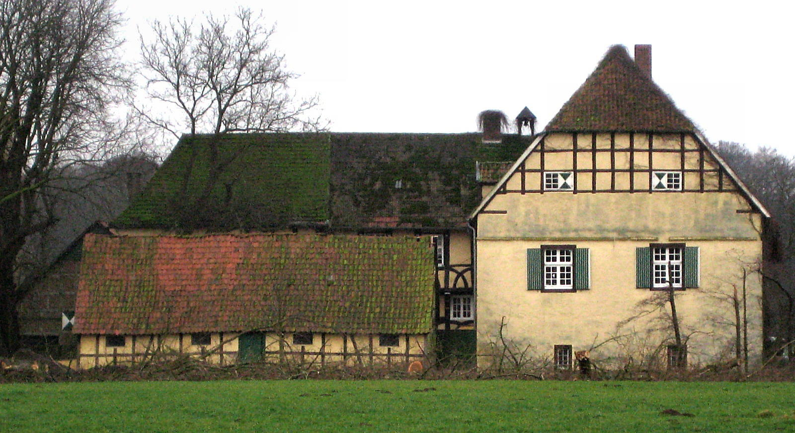 Burg Scheventorf, Bad Iburg, ist eine ehemalige Wasserburg, die sich in Privatbesitz befindet. Sie wurde 1552 von Johann von Hake gebaut. Aufgenommen von der B 51